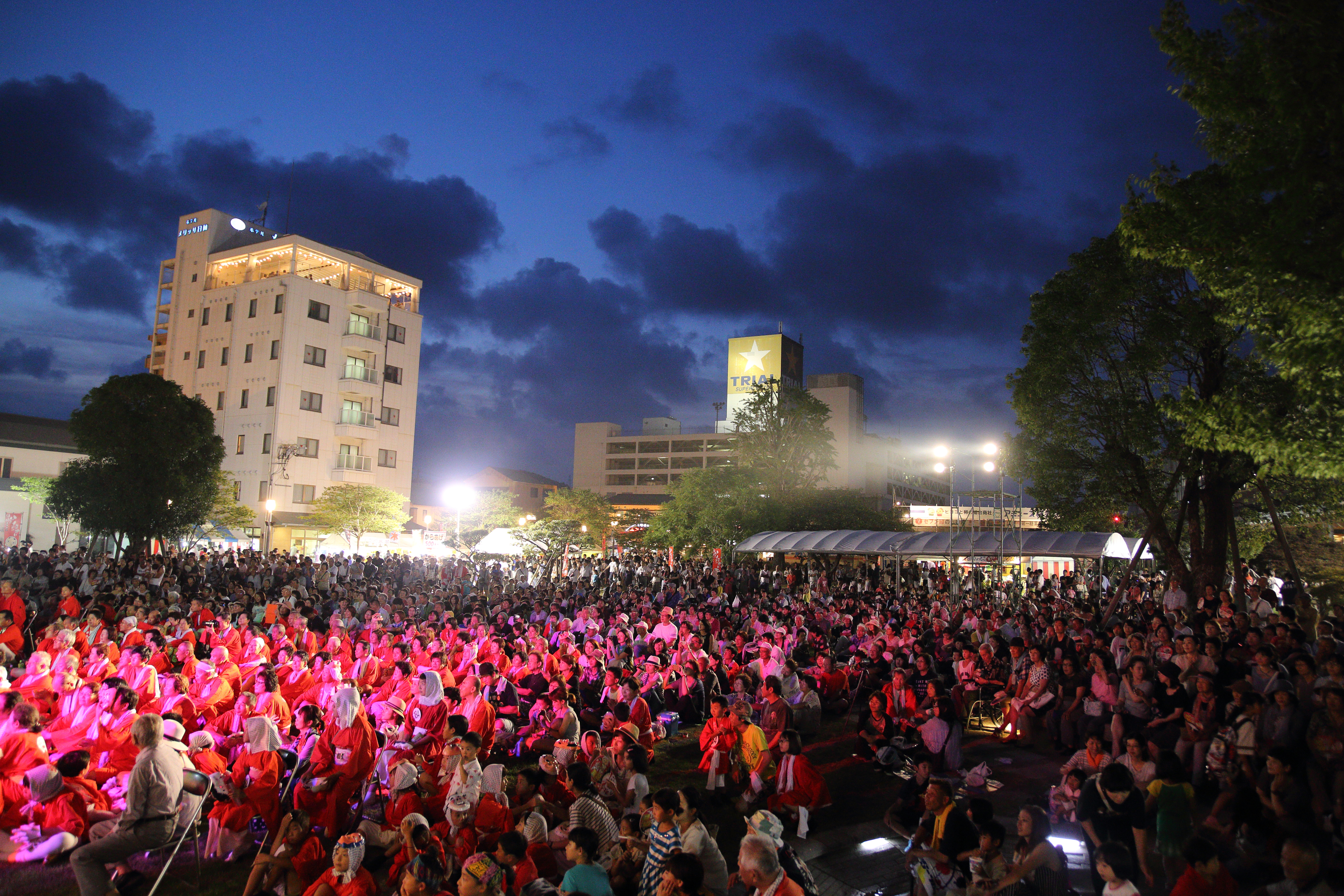 前夜祭開会前の様子